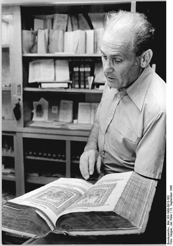 Keilhau, Sprachheilschule, Bibliothek Zum Beitrag: Erziehen mit viel Feingefühl und Liebe - In der Sprachheilschule "Friedrich Fröbel" erlebt ADN-ZB Kasper - 13. 9. 1988 - ha. Über ein kleines Museum mit Gegenständen der verschiedensten Art, mit Büchern, Noten und Spielzeugen, verfügt der Direktor der Sprachheilschule "Friedrich Fröbel", Alexander Hübener. Bevor er an die vor 32 Jahren gegründete Sprachheilschule nach Keilhau, Kreis Rudolstadt, kam, war Alexander Hübener seit 1946 Neulehrer. Er unterrichtete noch an einer einklassigen Dorfschule mit 94 Kindern. Das pädagogische Vermächtnis Fröbels liegt dem Direktor sehr am Herzen. (Hierzu gehören 1988-0913-300 - 303 N)